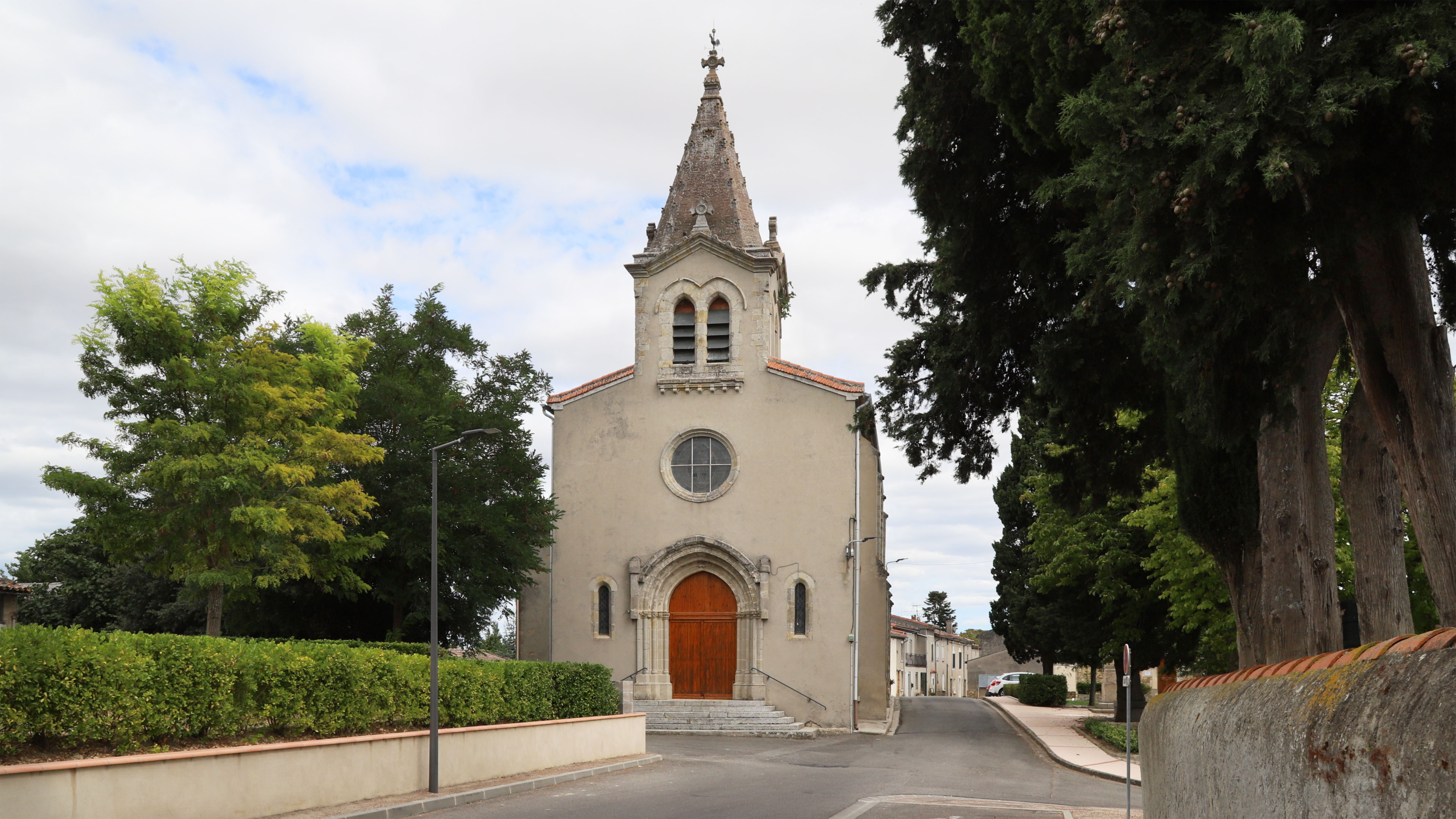 L'église